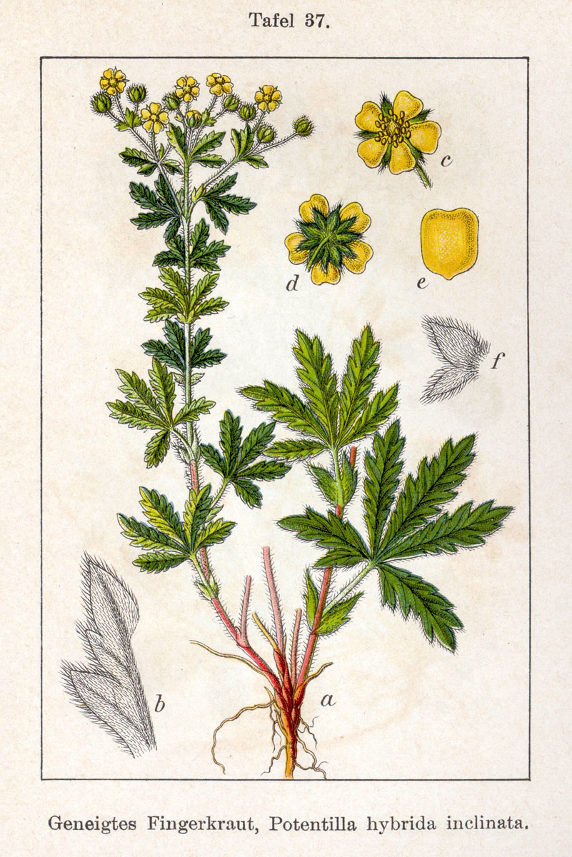 Potentilla inclinata Vill. Original Description Geneigtes Fingerkraut, Potentilla hybrida inclinata